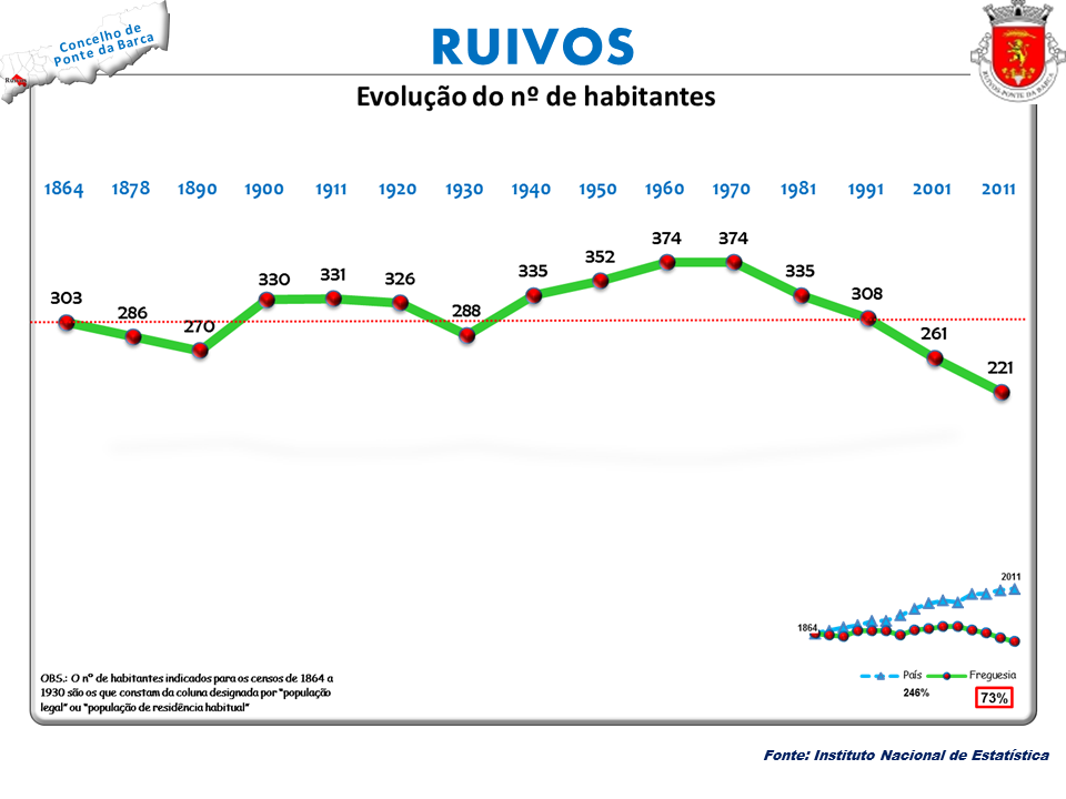 Censos 1864/2011